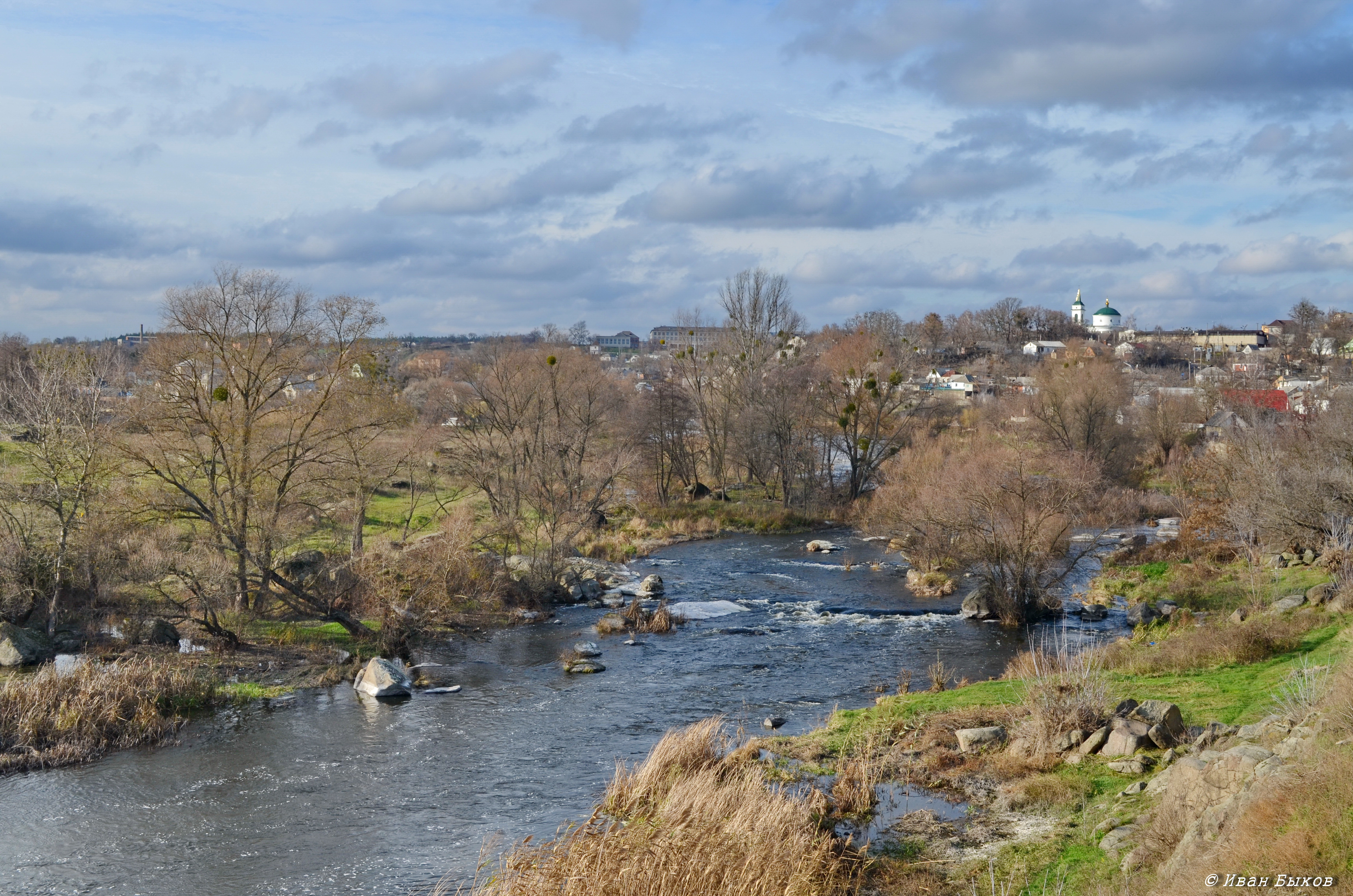 Богуслав. Свято-Троїцький собор, пам'ятка архітектури національного значення (1830-і-1862 рр.) на фоні річки Рось